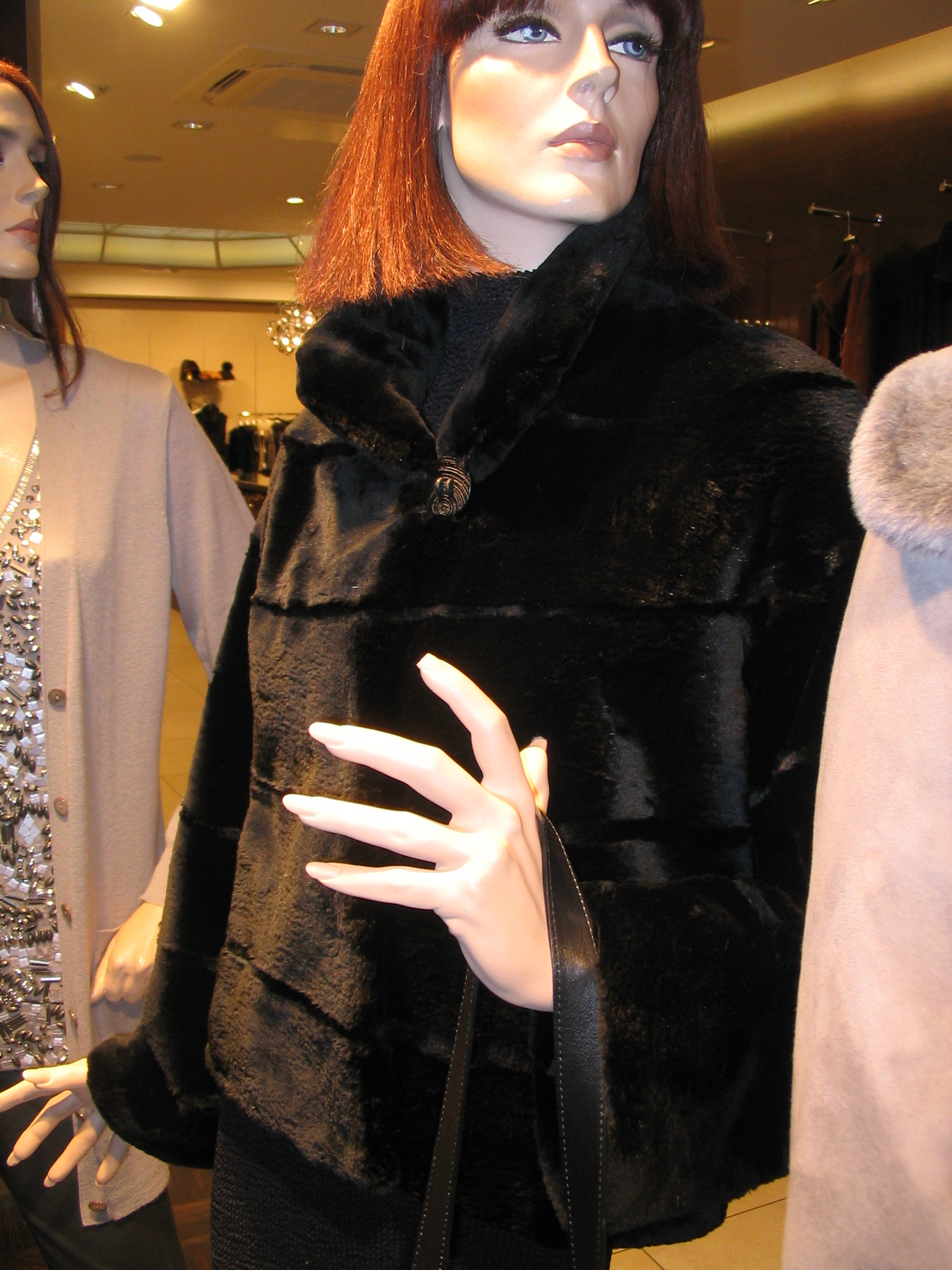 Jacke aus schwarz gefärbtem, geschorenem Biber. Gesehen bei BG Graupner, Mode & Style, Knochenhauerstraße 41/42 28195 Bremen, Deutschland. Inhaber Birgit Graupner.